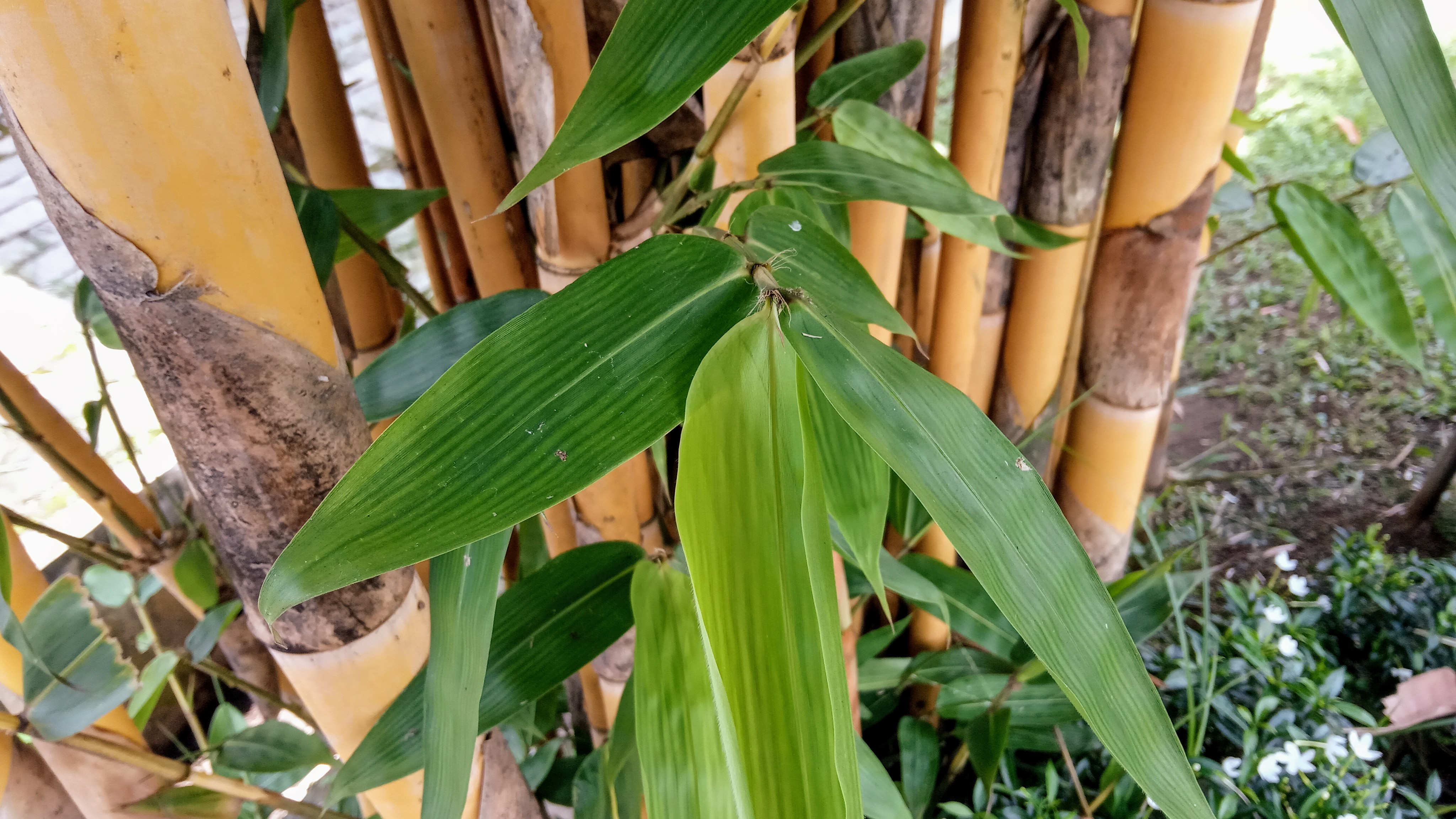 Pohon Bambu Kuning